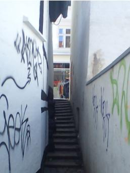 Latinergyden mod Gravensgade